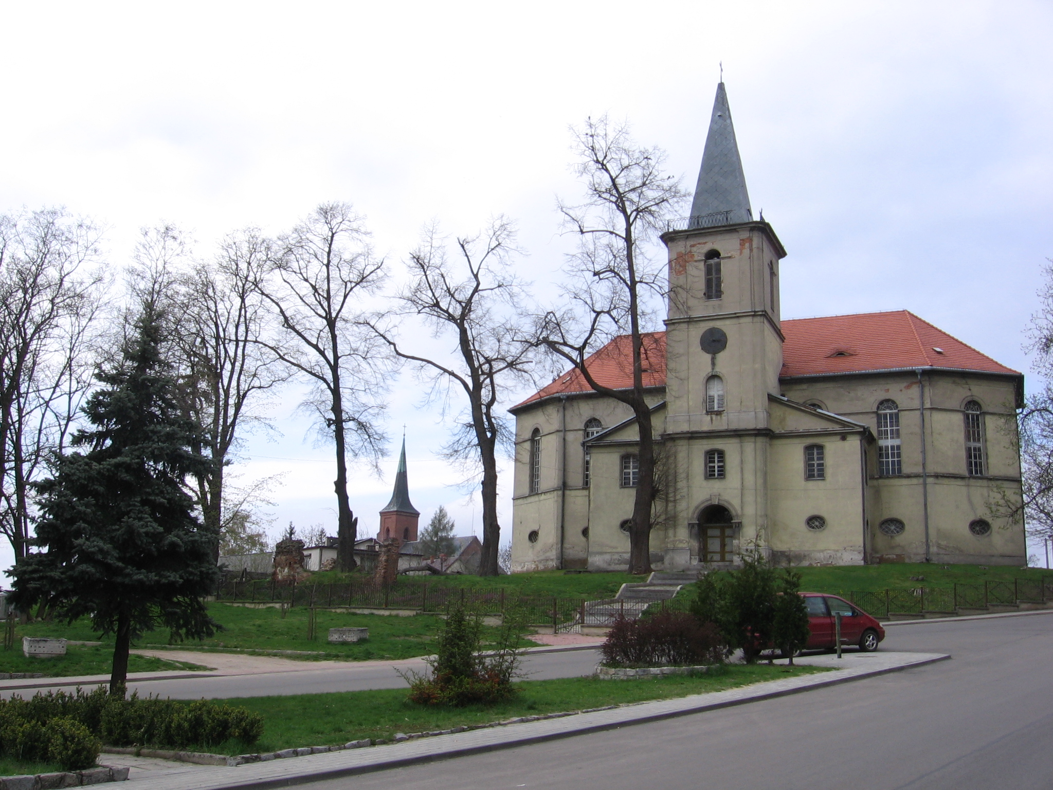 Kościół ewangelicko-augsburski pw. Świętego Krzyża w Międzyborzu na Dolnym Śląsku